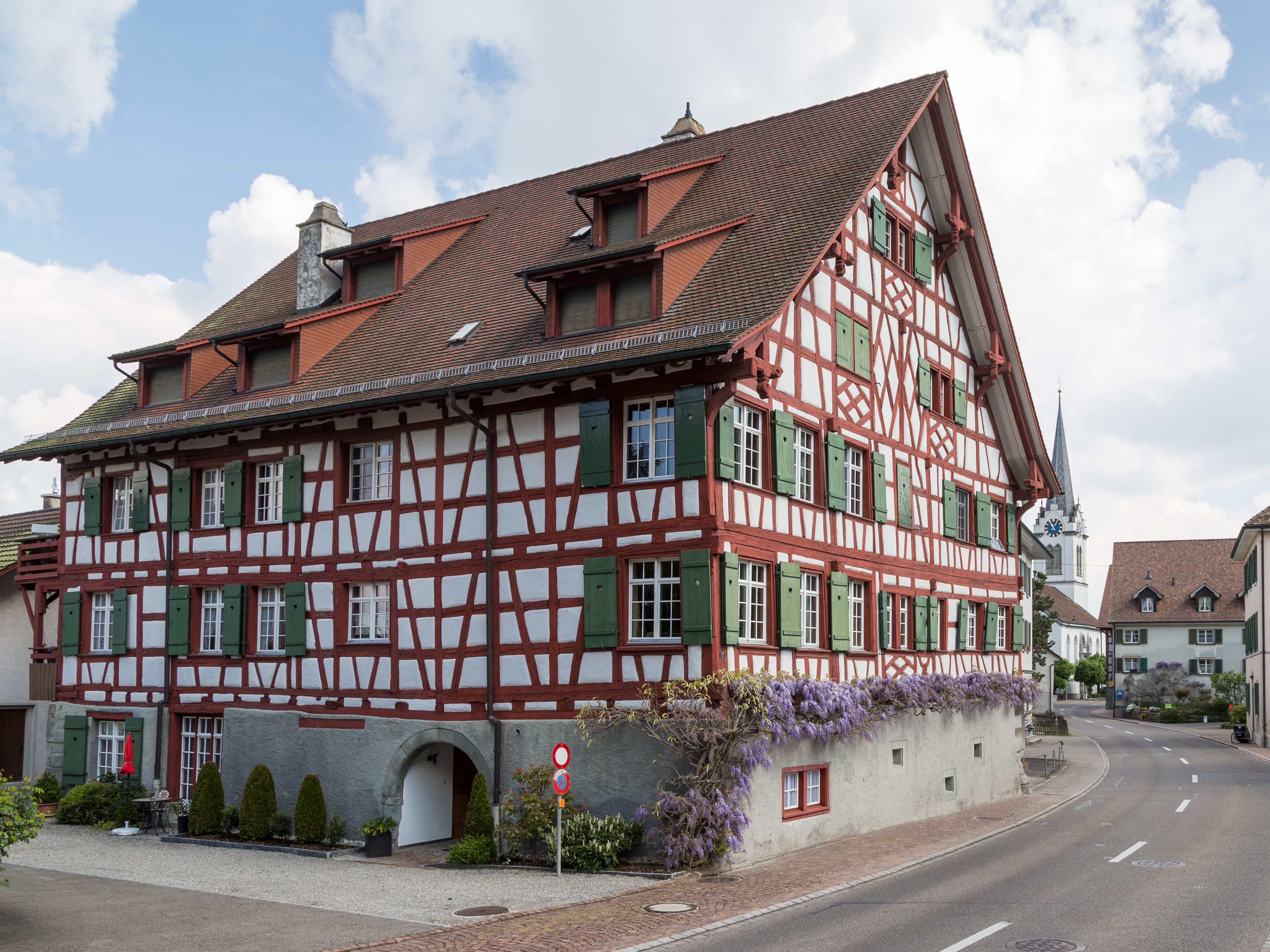 Grosses Haus/Kehlhof in Berlingen TG